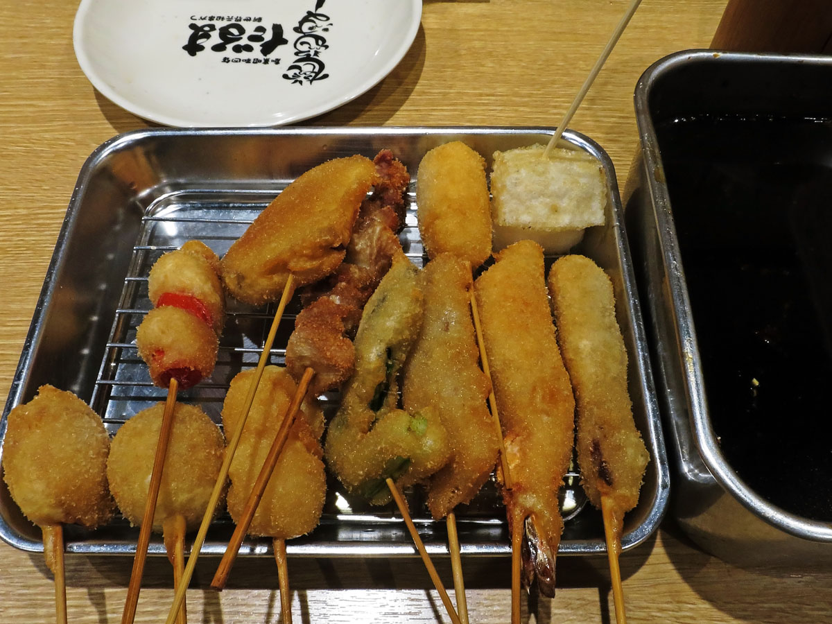 KushikatsuDaruma01.jpg